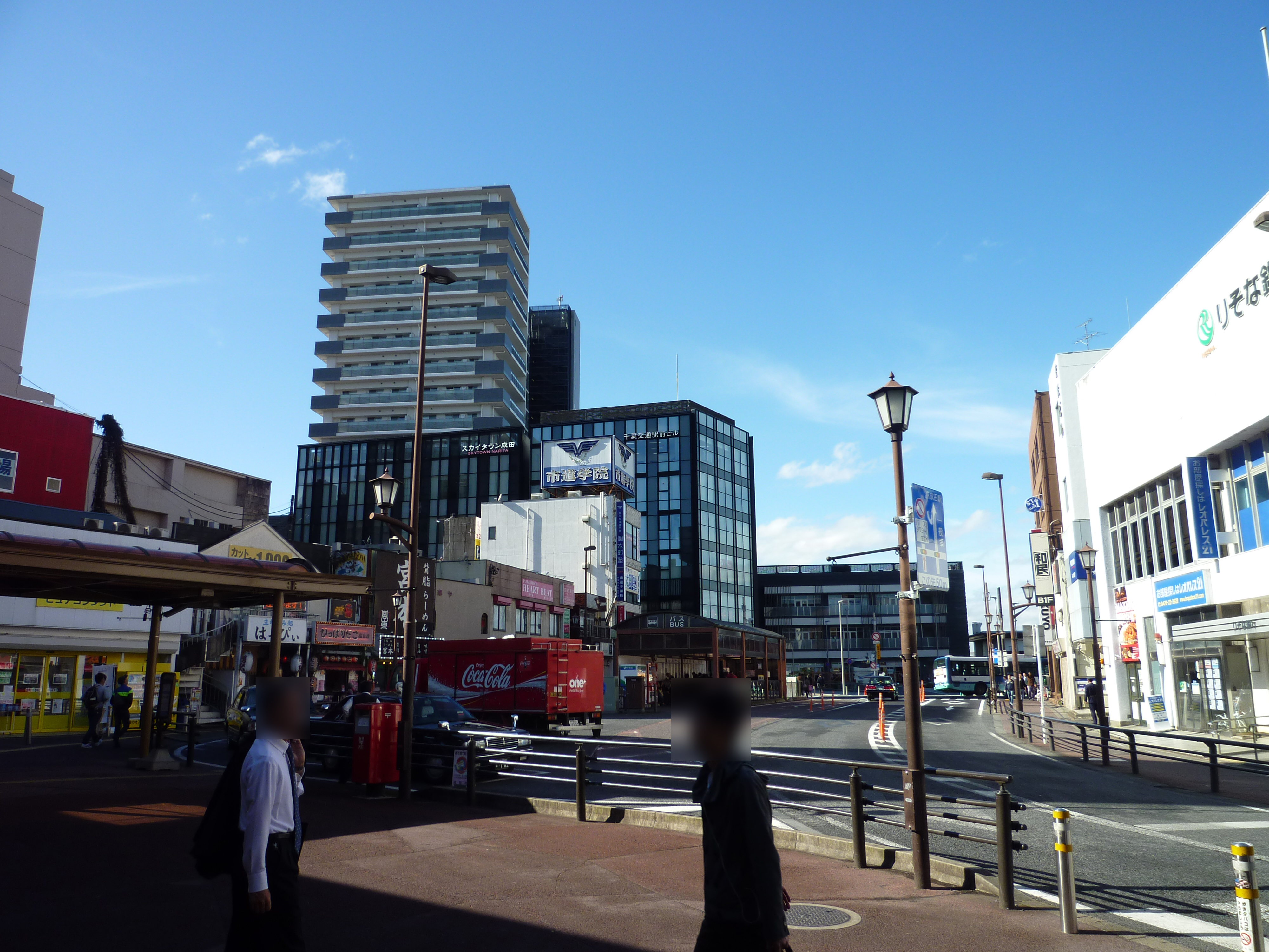 スカイタウン完成後の京成成田駅西口